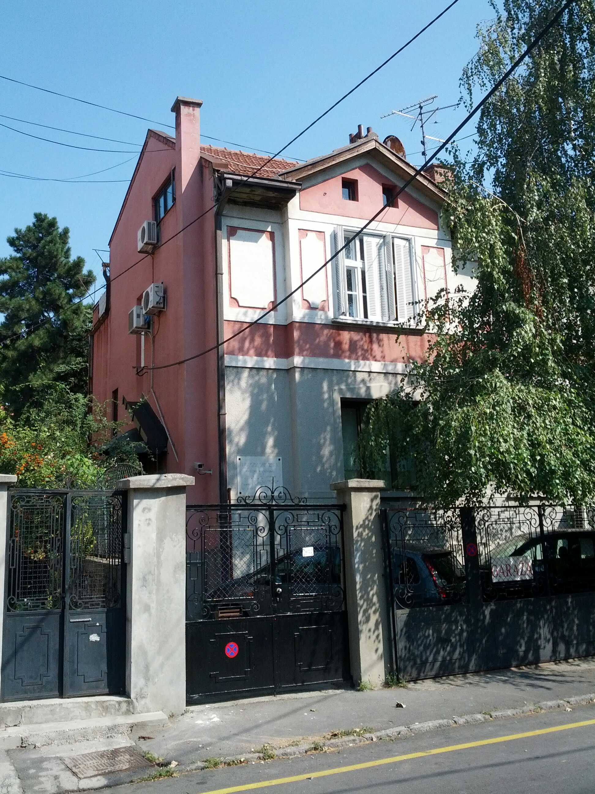 Кућа Милутина Миланковића 2.1 (Android).